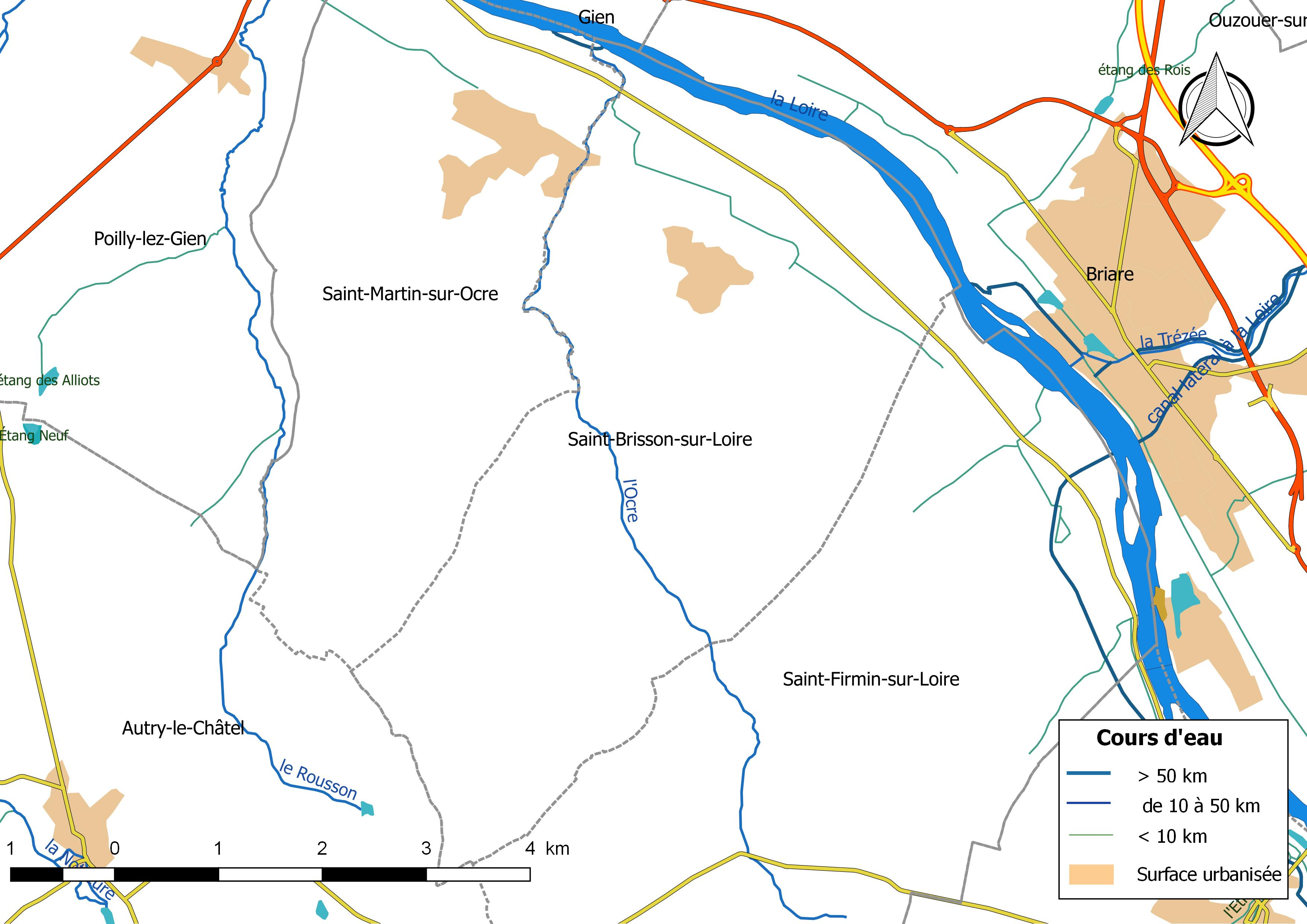 Carte du réseau hydrographique de la commune de Saint-Brisson-sur-Loire (France).